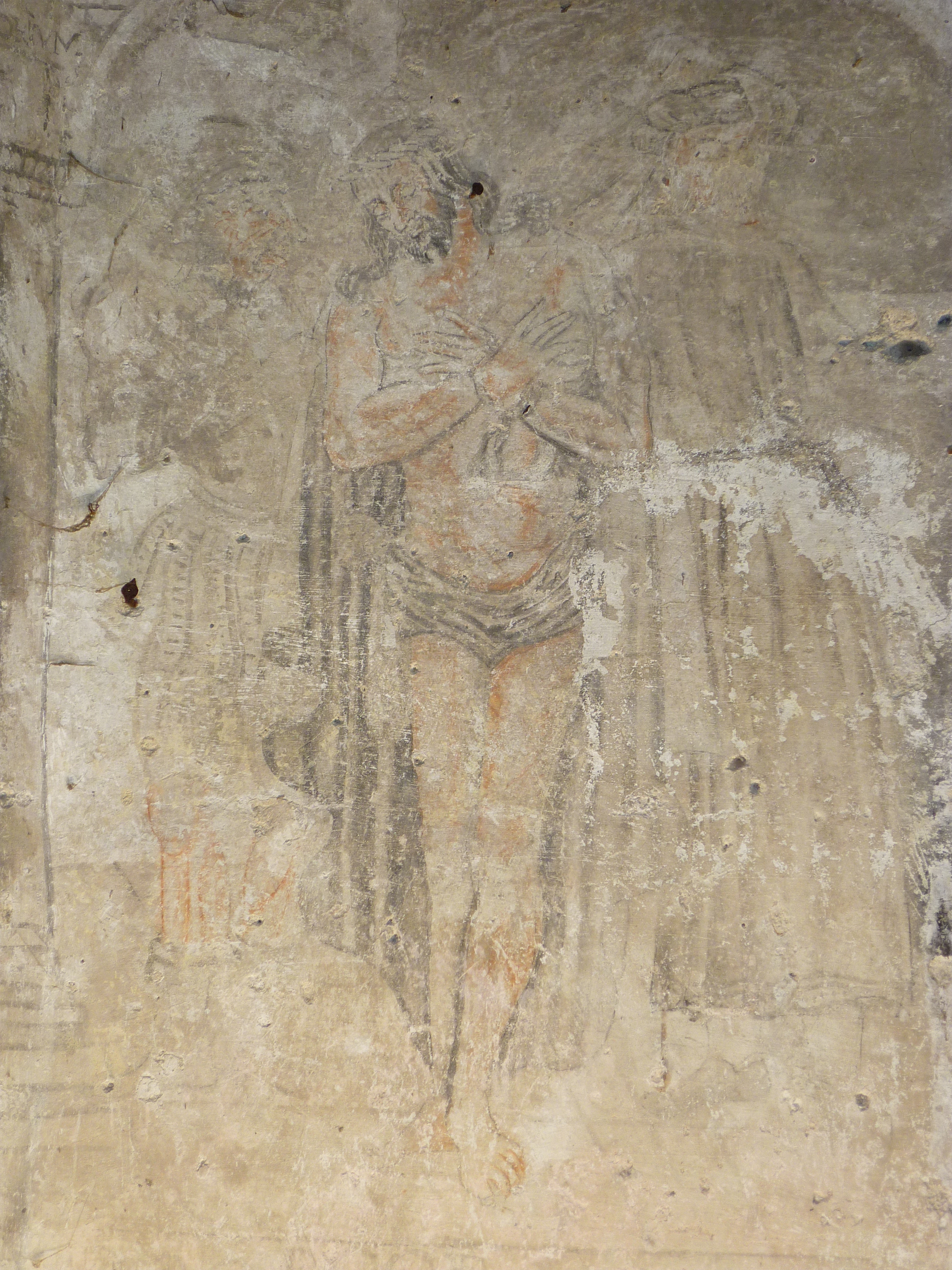 Cette fresque a été découverte dans la tour principale du prieuré de Ris par un travail des Beaux-Arts de Clermont-Ferrand